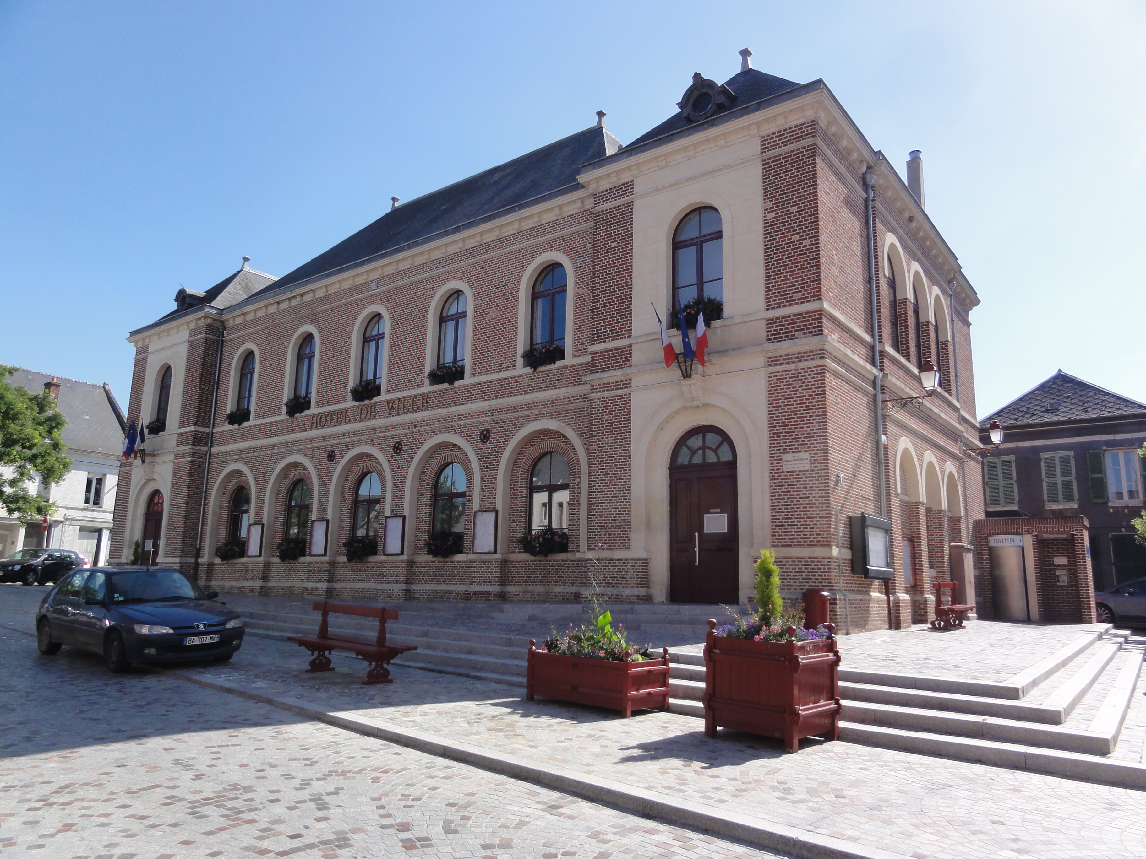 Marle-sur-Serre (Aisne) mairie